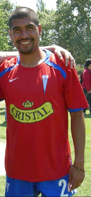 Jorge Ormeño, Universidad Catolica